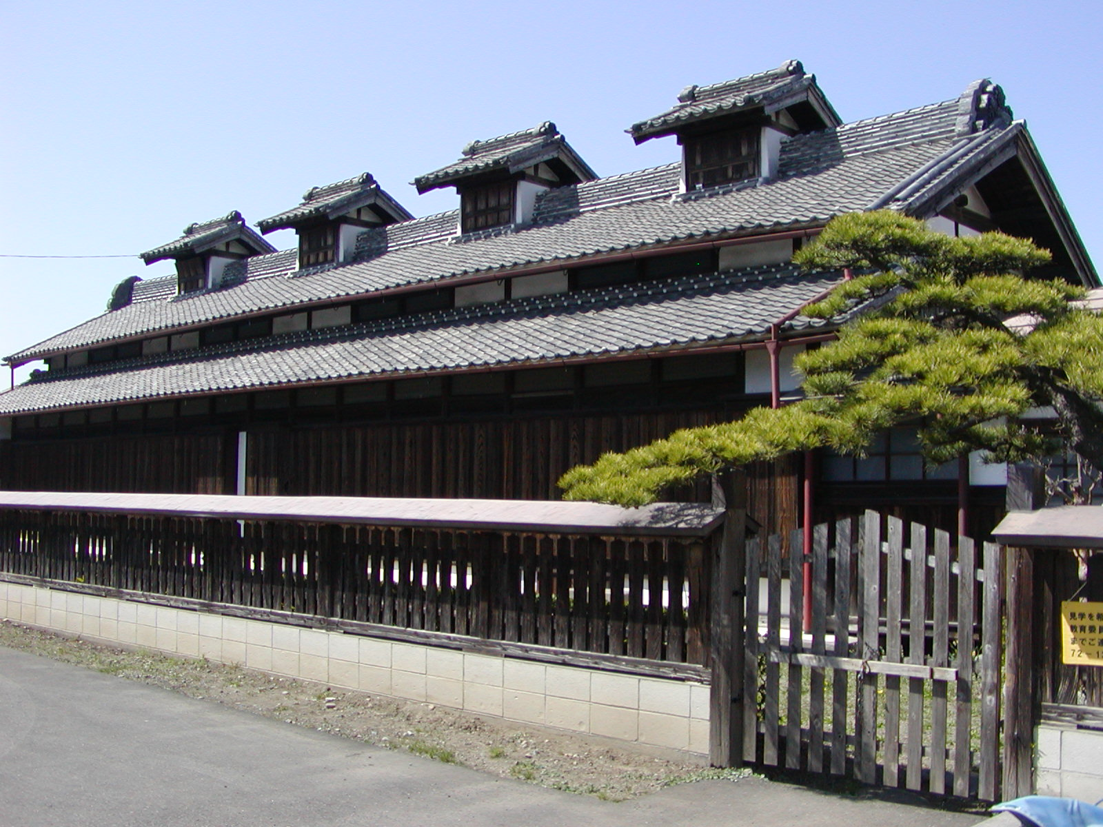 競進社模範蚕室（埼玉県有形文化財）